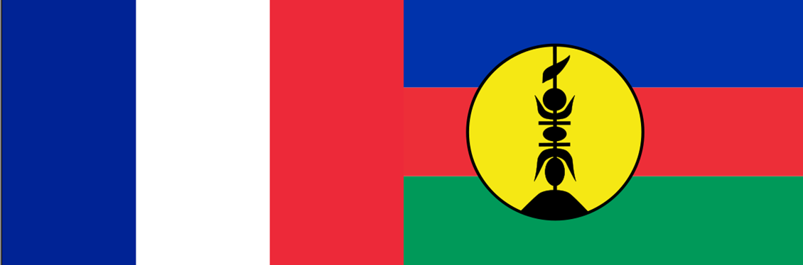 Drapeaux adoptés par le congrès de la Nouvelle-Calédonie le 13 juillet 2010